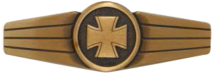 Tätigkeitsabzeichen für Kompaniefeldwebel, Schiffs-/Geschwaderwachtmeister der Bundeswehr Voraussetzungen: Stufe I, Bronze: Nach 6 Monaten Dienstzeit in fachbezogener Verwendung. Stufe II, Silber: Nach 5 Jahren fachbezogener Verwendung. Stufe III, Gold: Nach 10 Jahren fachbezogener Verwendung. Ausführung: Kreis mit Eisernem Kreuz, beidseitig mit vier Streifen eingefasst, metallgeprägt; bronze-, silber- oder goldfarben.